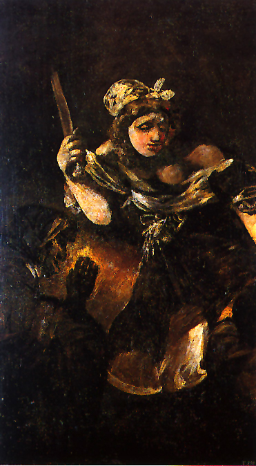 Judith y Holofernes. Pintura al óleo sobre muro trasladada a lienzo. 143,5 x 81,4 cm. Museo del Prado (Madrid)